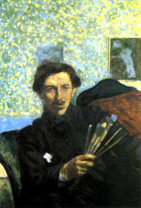 Self-portrait